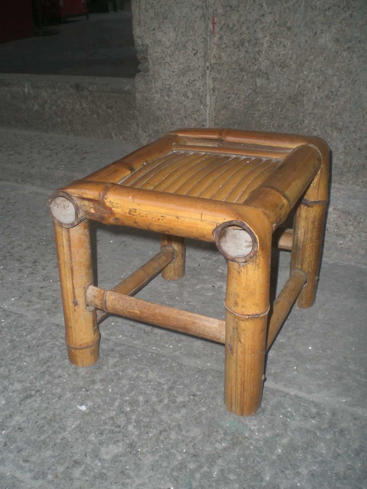 油麻地 榕樹頭 油麻地天后廟 竹製品 中式傢具 椅